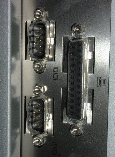 (c) 2004 Wim van 't Einde Vaassen